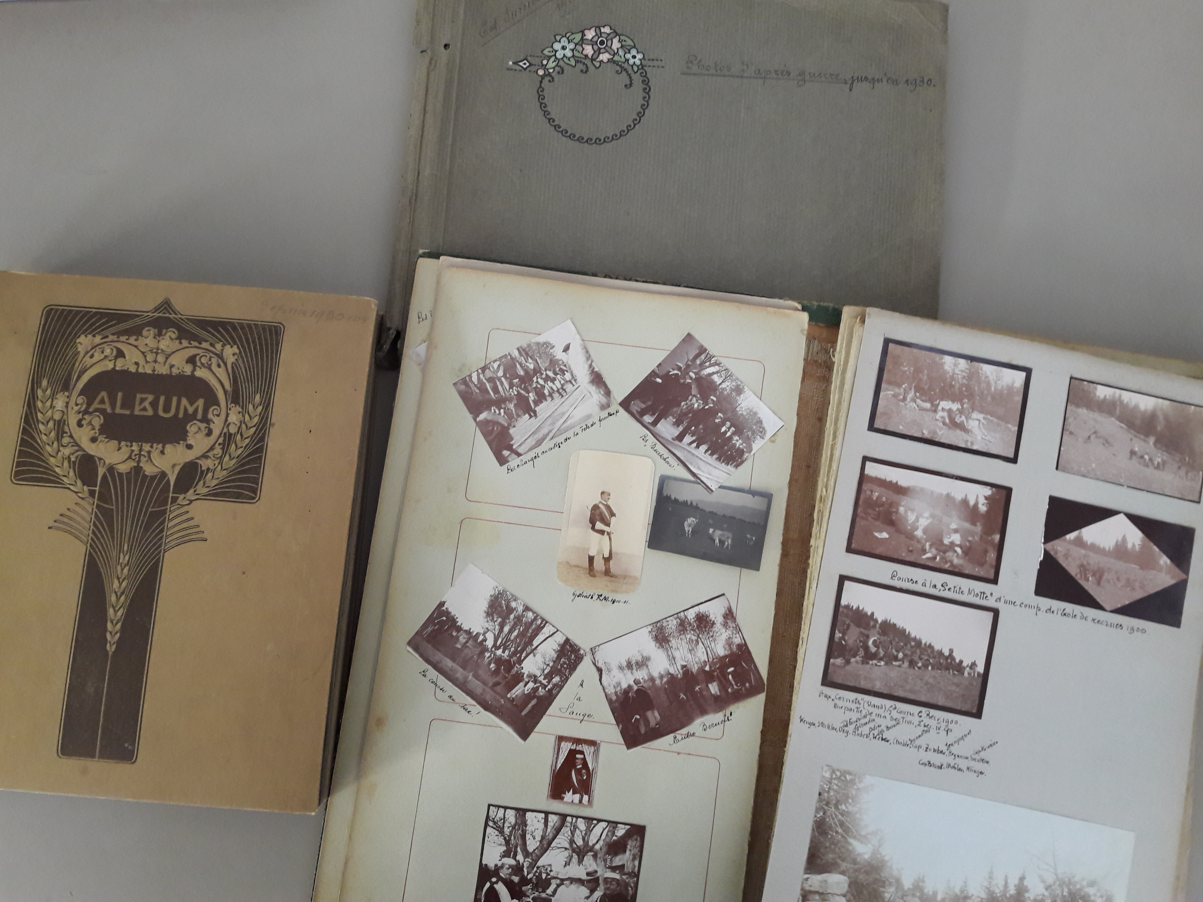 Photo de photographies noir/blanc dans un album